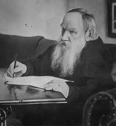 Толстой Лев